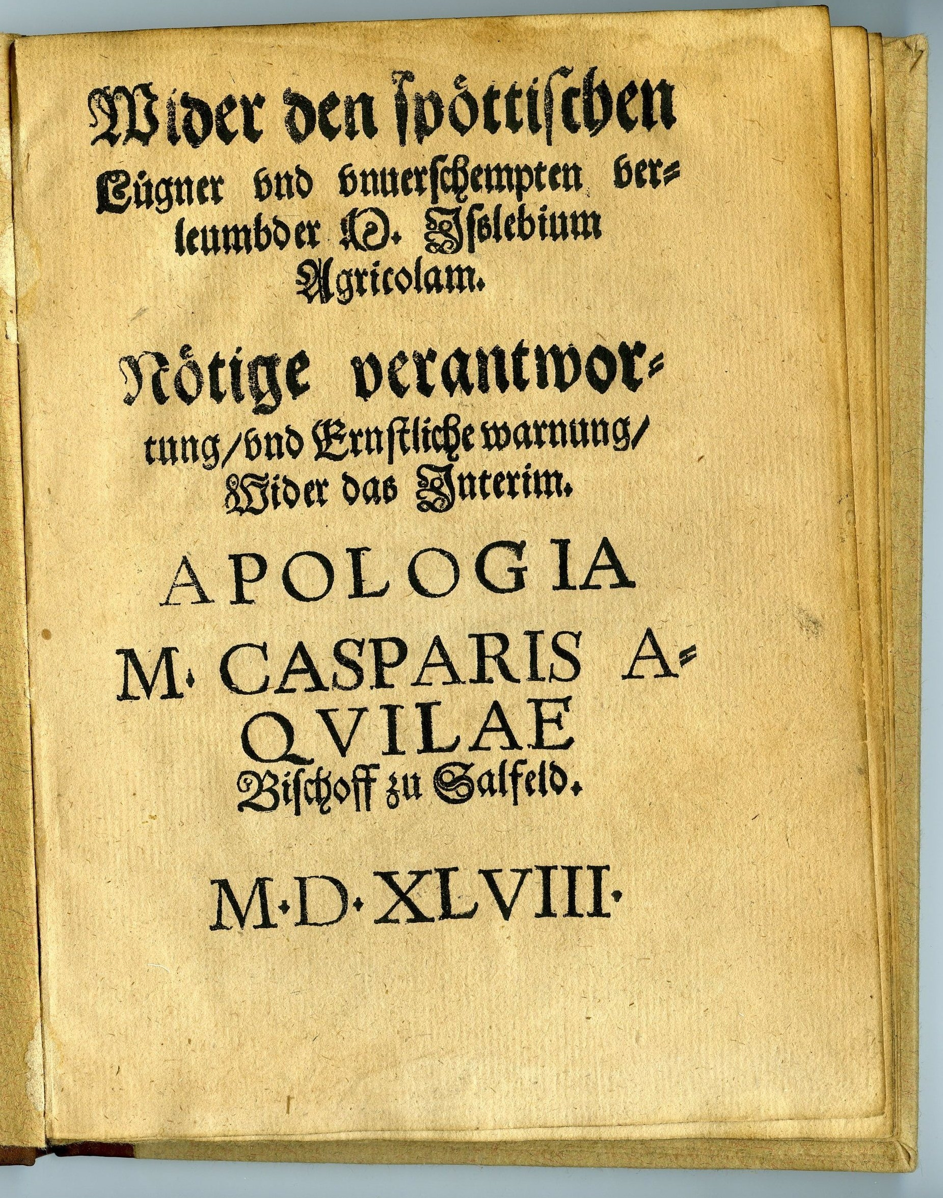 Wider den spöttischen Lügner und unverschempten Verleumder M. Isleblum Agricolam — Titelseite (Caspar Aquila)